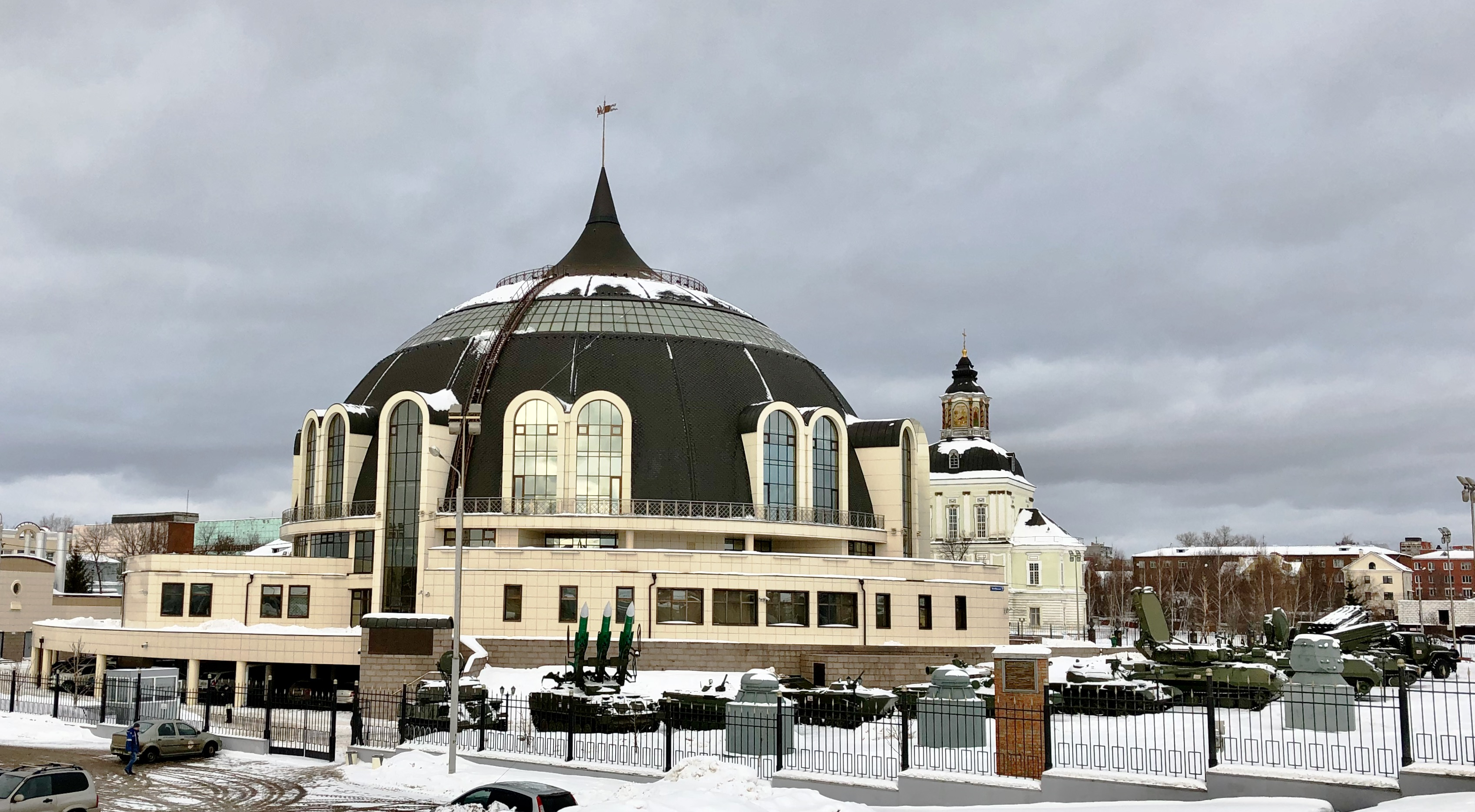 Государственный музей оружия